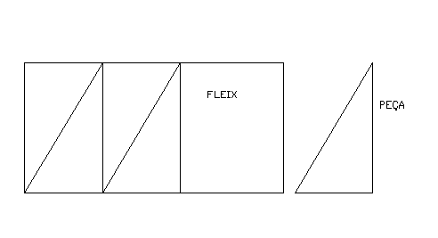 Fleje con piezas que se van a cortar,y la pieza obtenida